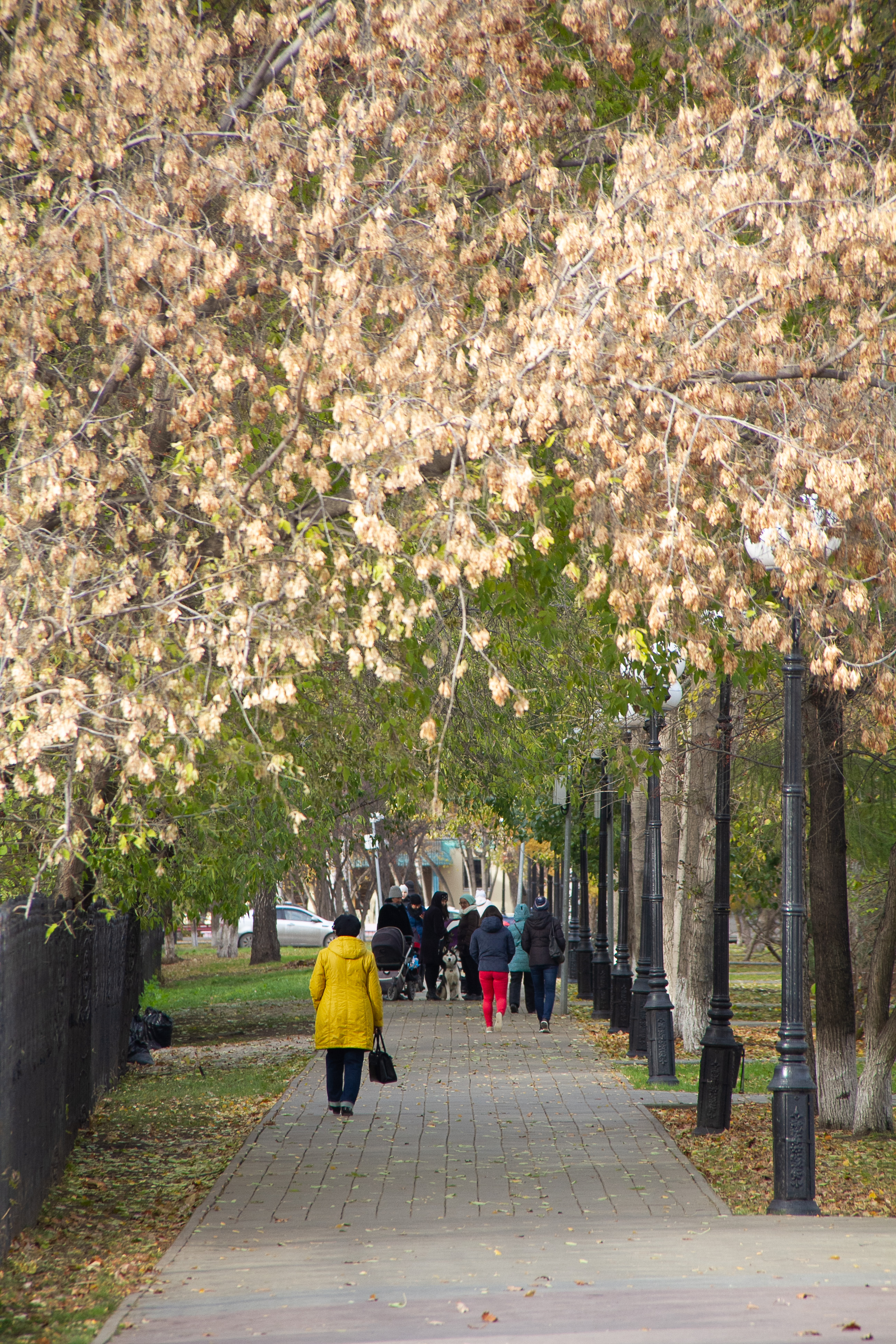 Текутьевский бульвар. г. Тюмень.